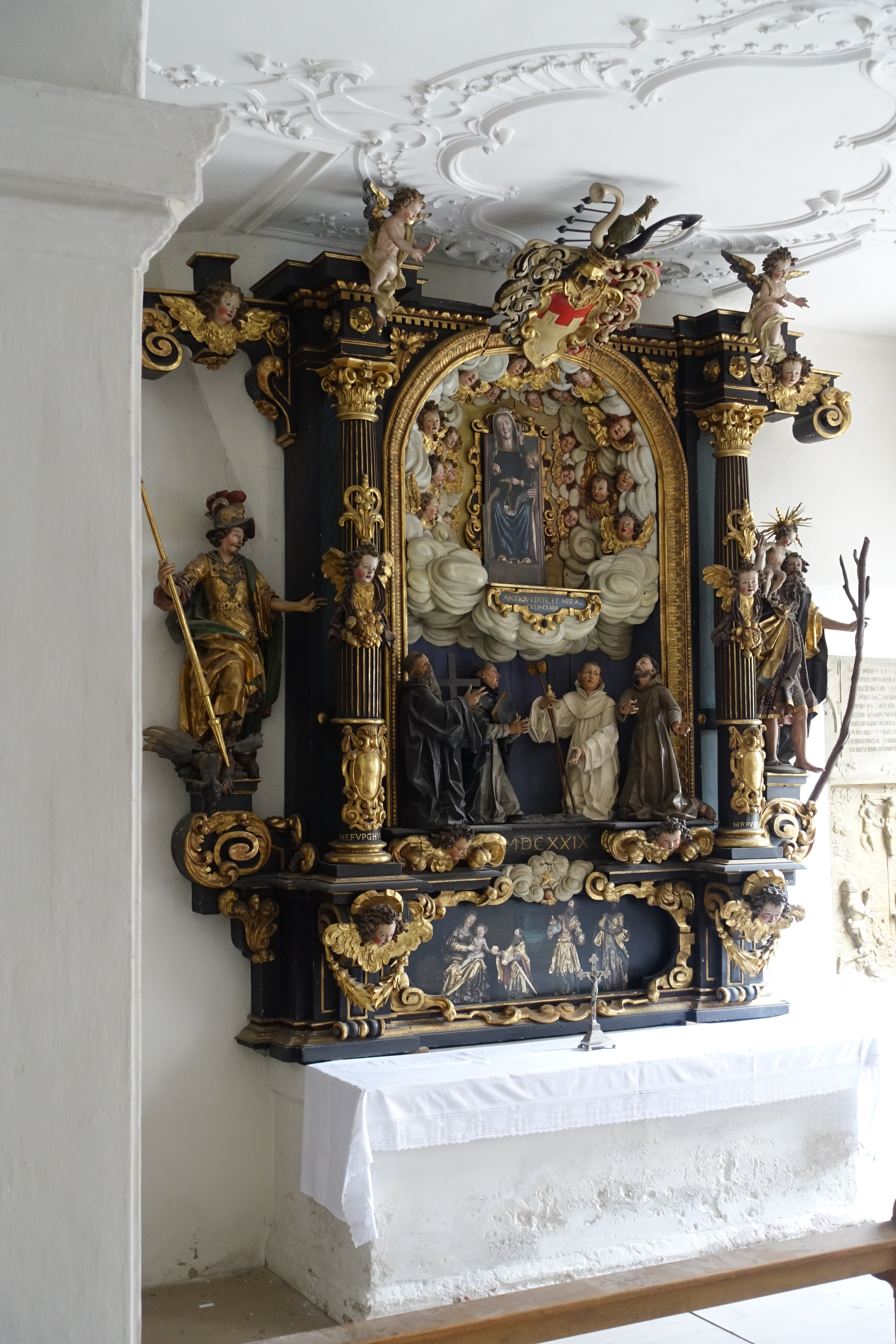 Altar in der Seitenkapelle